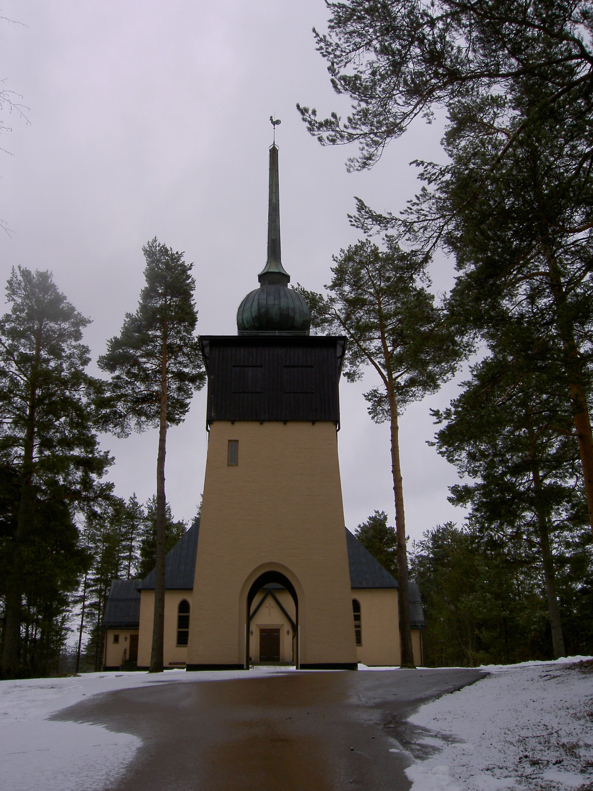 Fors kapell och klockstapel/chapel and campanile, Malungsfors, Sverige/Sweden